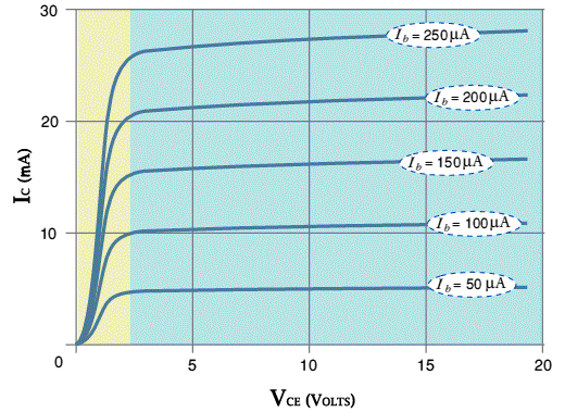 Curva caracteristica do transistor